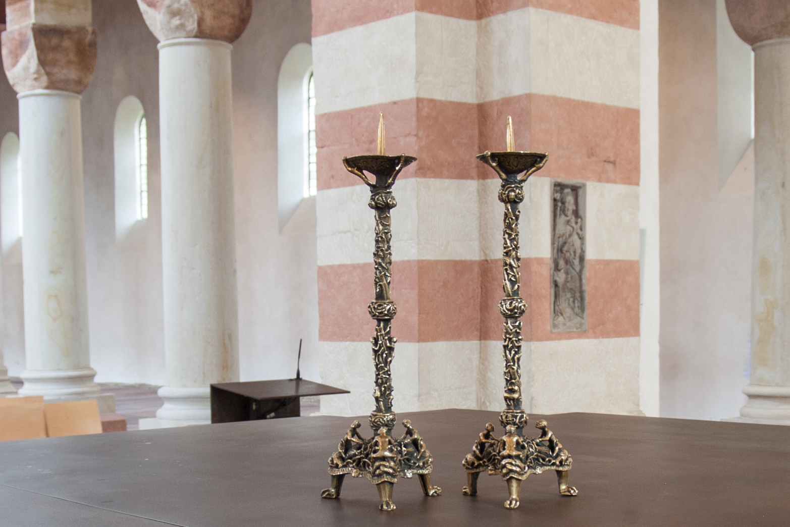 Leuchterpaar St. Bernwards, Bischof zu Hildesheim 993–1022, originalgetreue Nachbildung, Höhe: 40 cm, Breite: 13 cm. Aufgenommen in der Michaeliskirche zu Hildesheim. Produzent: Gold-und Silberschmiede Th. Blume Hildesheim